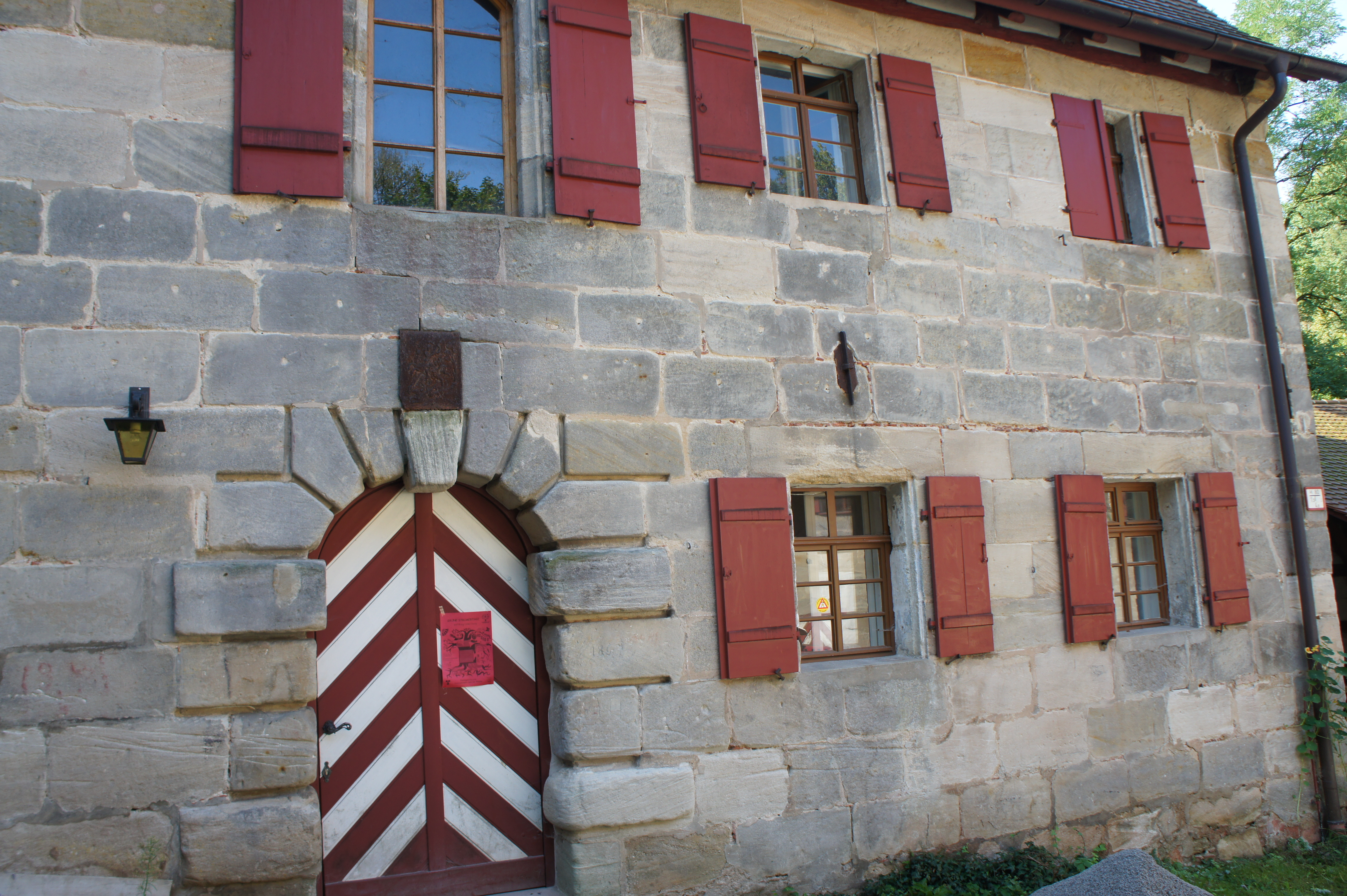 Schloss und Burganlage Grünsberg aus dem 13. Jahrhundert, Landsitz verschiedener Nürnberger Patrizierfamilien, seit dem 18. Jahrhundert im Besitz der Stromer, einer der ältesten und bedeutendsten Patrizierfamilien Nürnbergs. Pächterhaus mit Burgkapelle, 1561 von Endres Oertel errichtet